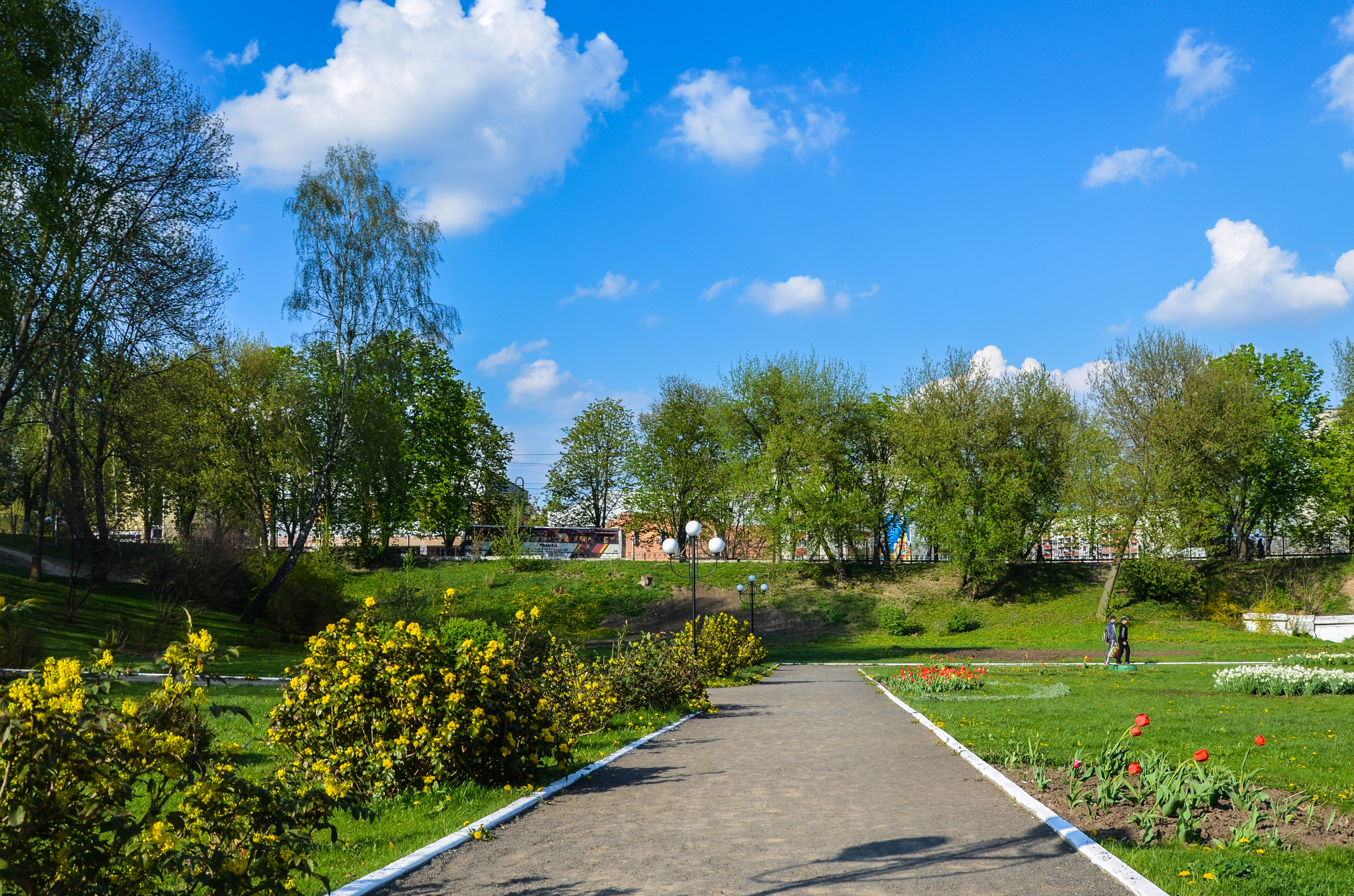 Ботанічний сад Хмельницького національного університету, квітень 2015 року.